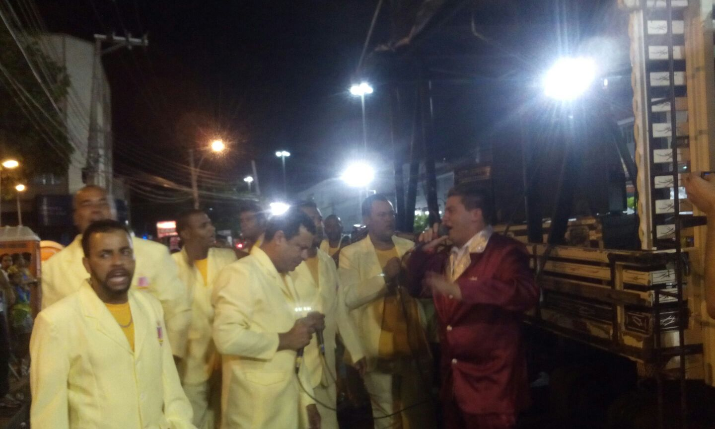 GRES União de Maricá